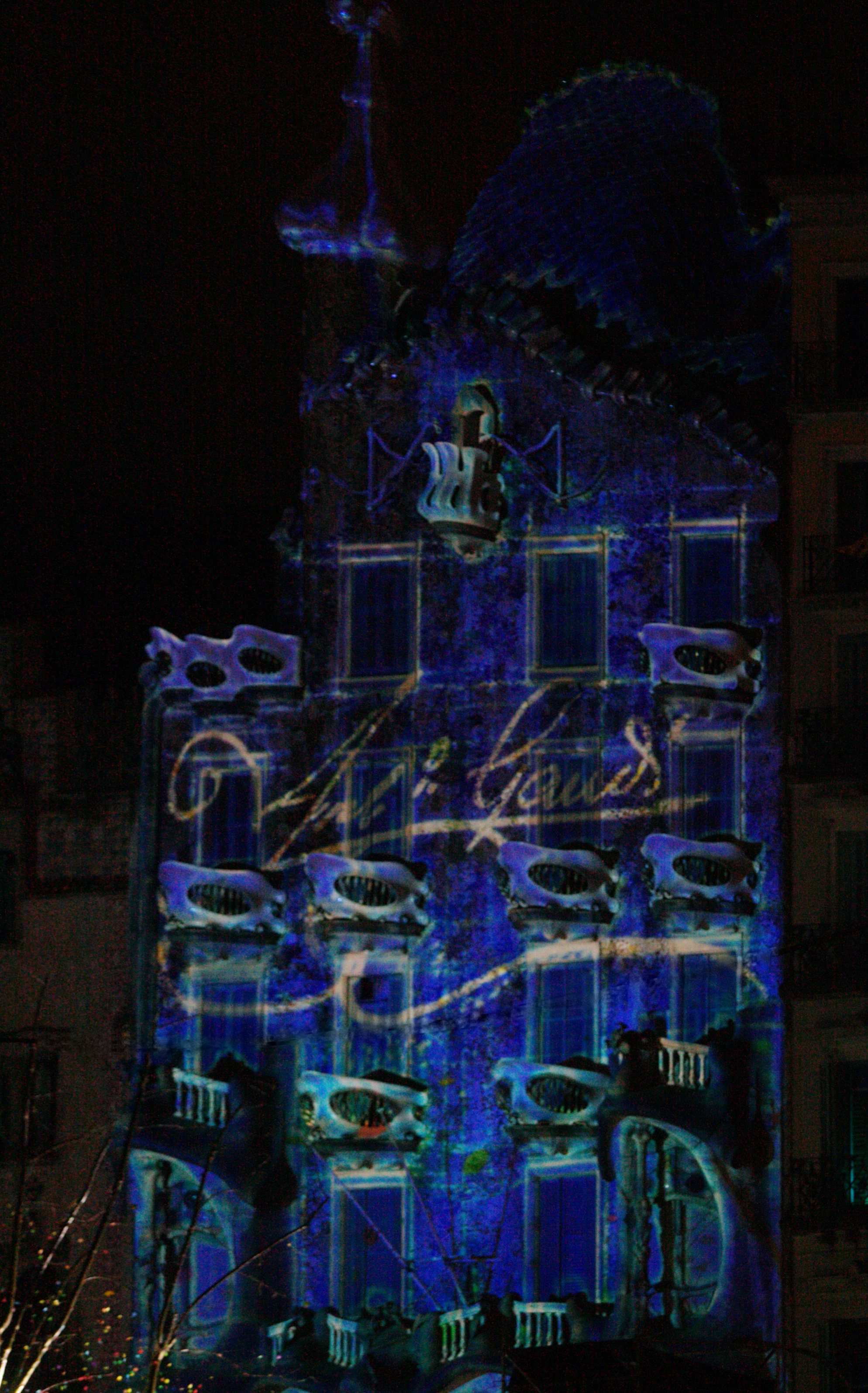 Signatura de Gaudí. Projecció en vídeo mapping en commemoració dels 10 anys de l'obertura al públic de la casa Batlló.